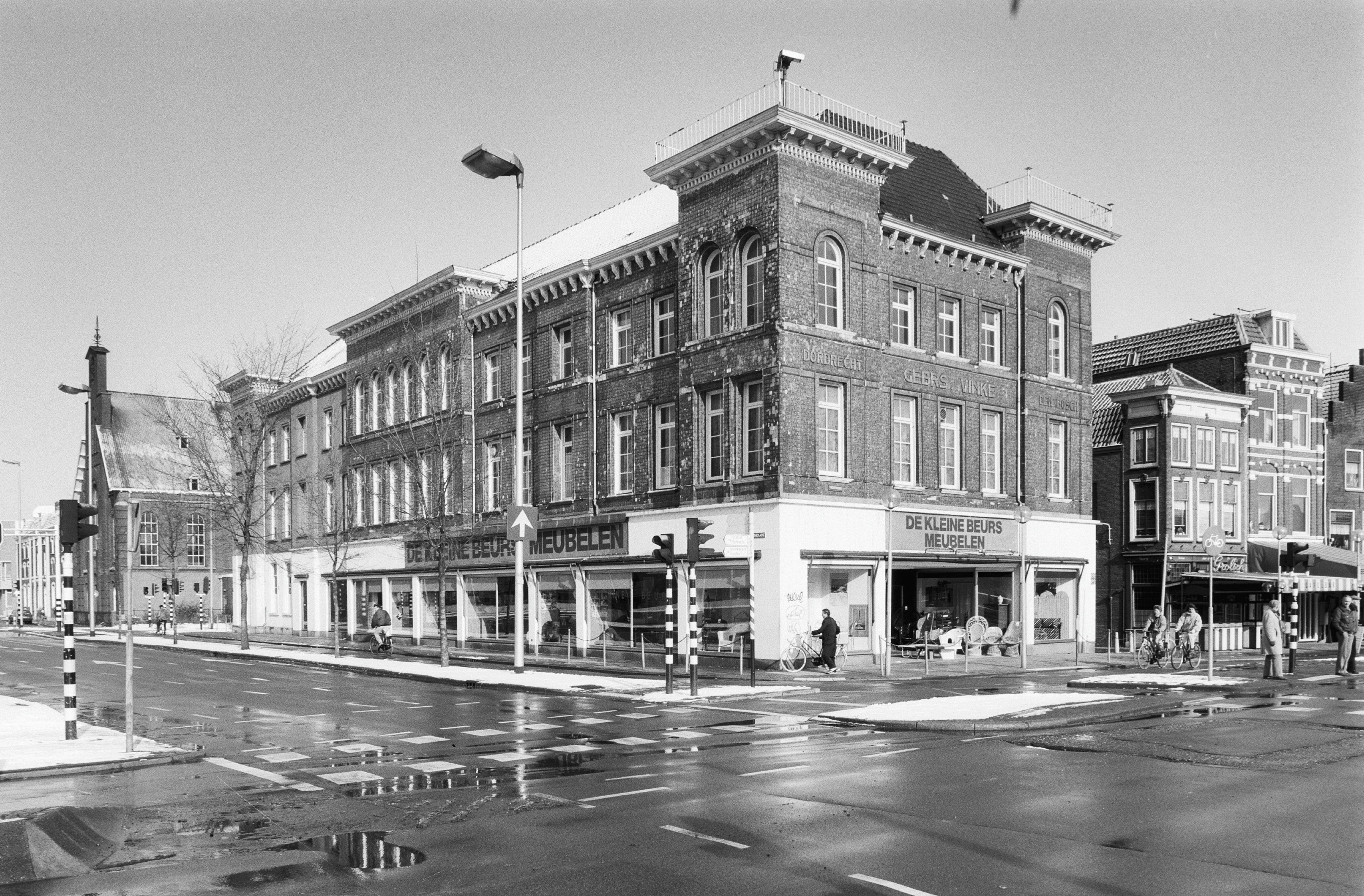 Overzicht